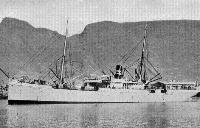 Der Küstendampfer Eduard Bohlen der Woermann-Linie